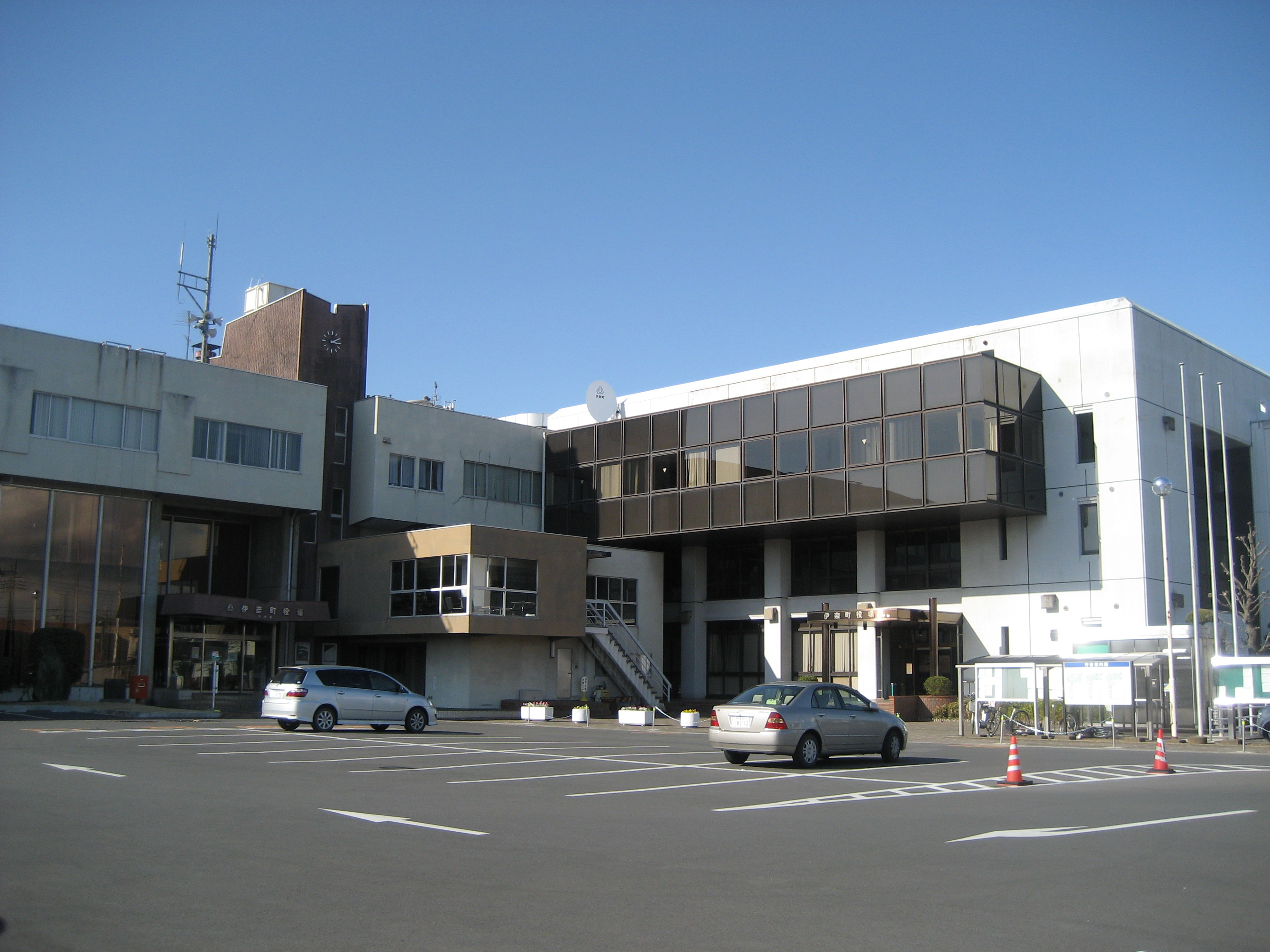 埼玉県伊奈町役場